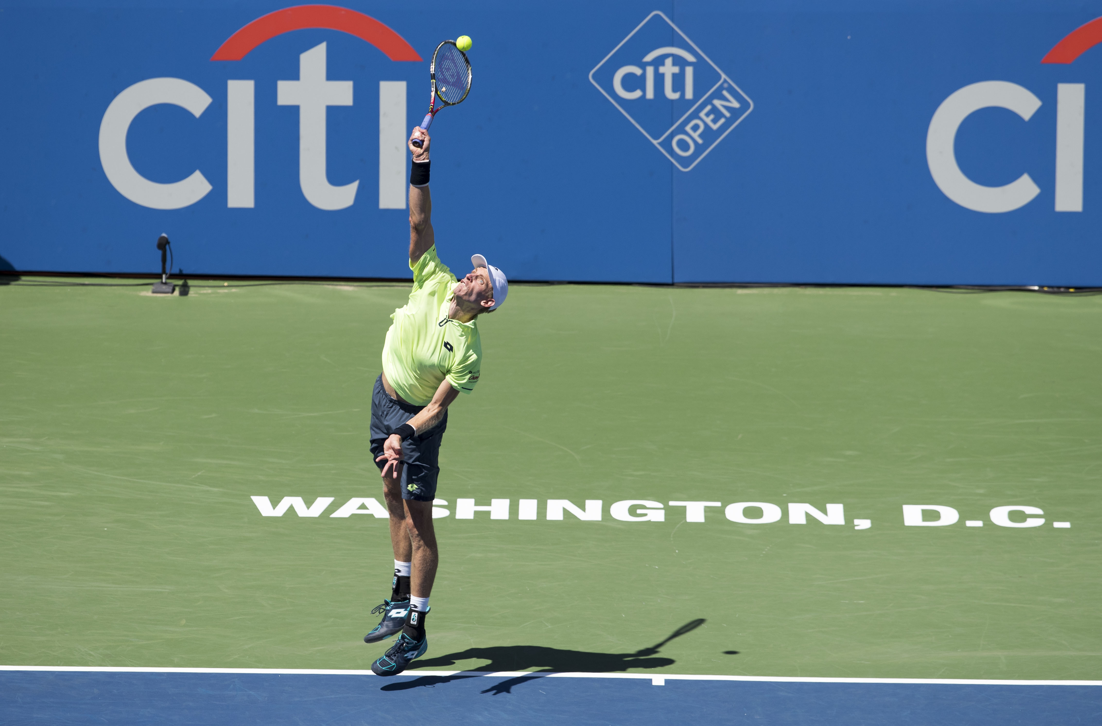 Citi Open Tennis 2017